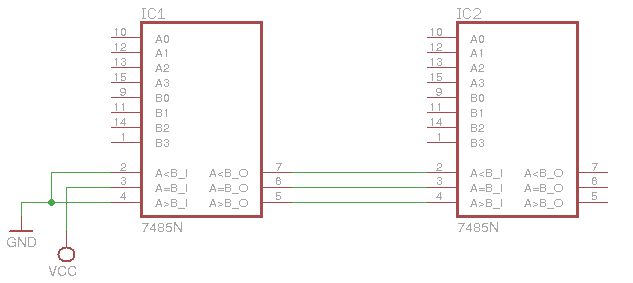 Comparador de 8 bits realizado con el c.i.7485 de 4 bits en cascada